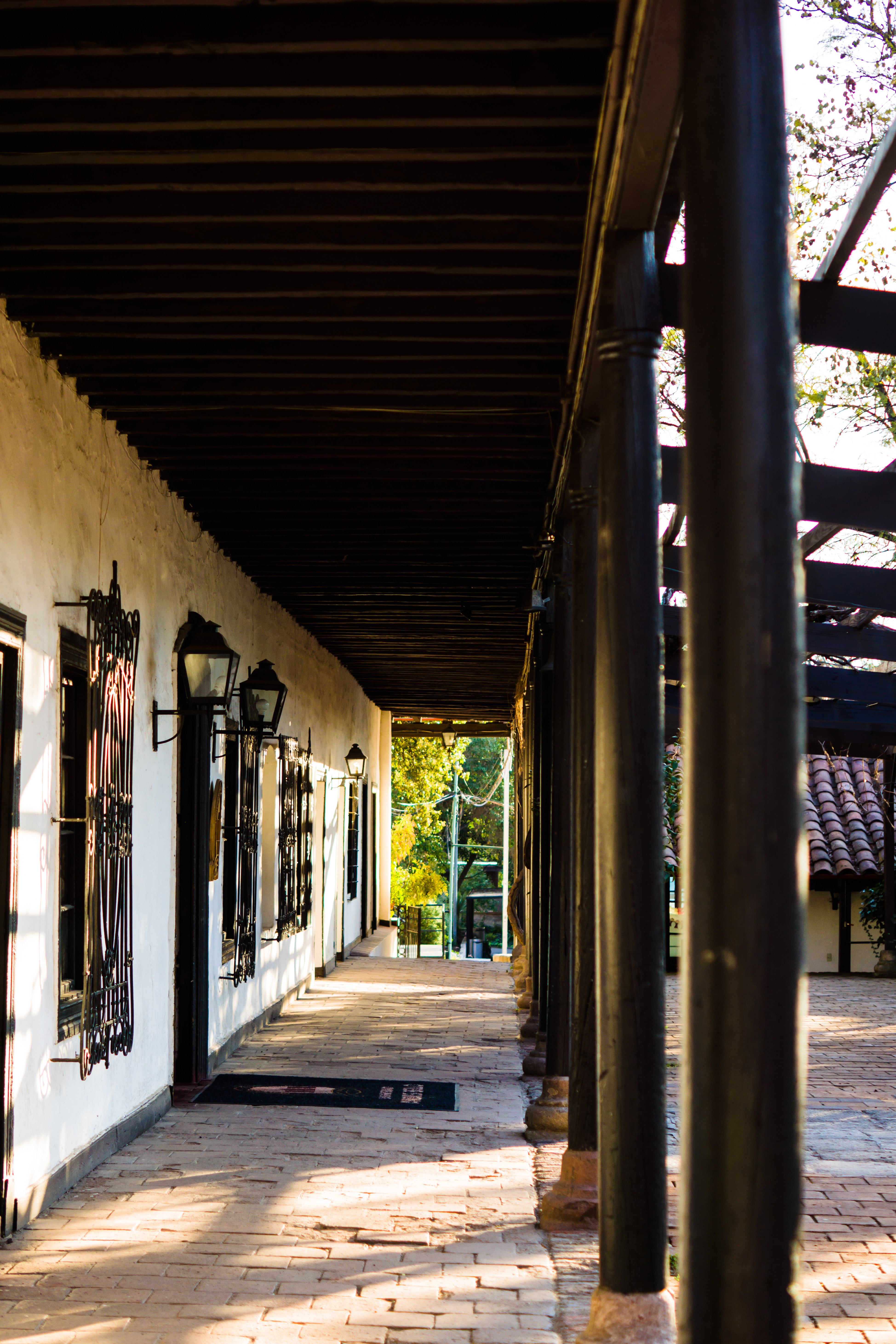 Casona de Las Condes This is a photo of a national monument in Chile: 847